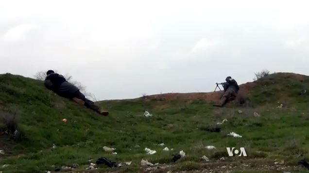 Combattants du Conseil militaire syriaque (MFS), près de Tal Tamer, 26 février 2015.